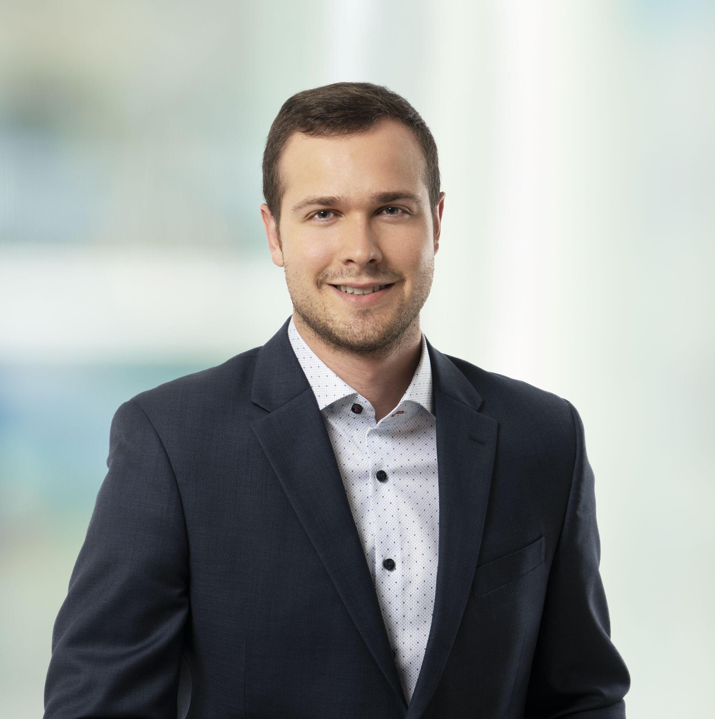 Député de Rimouski-Neigette-Témiscouata-Les Basques